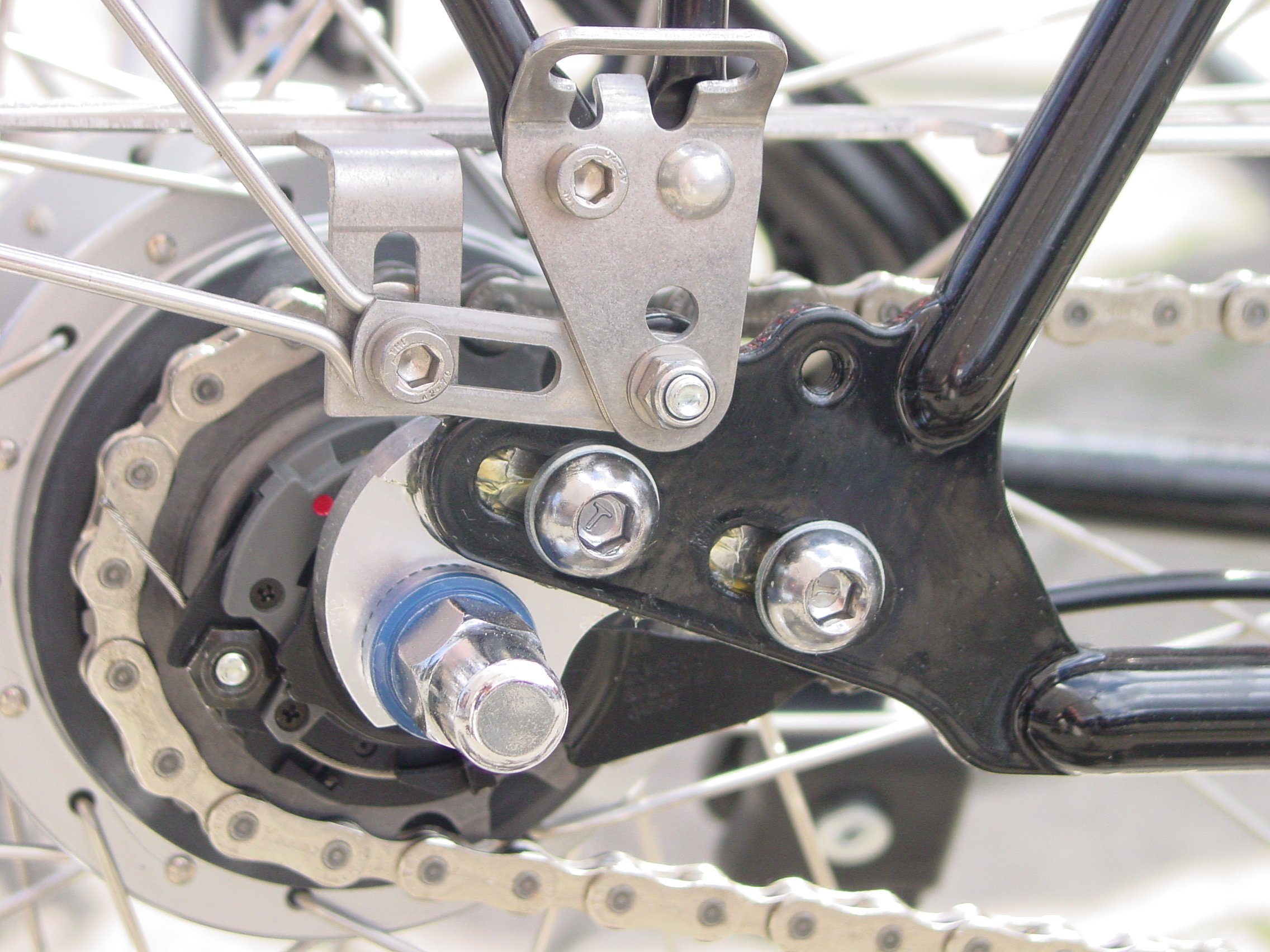 Fahrradtechnik